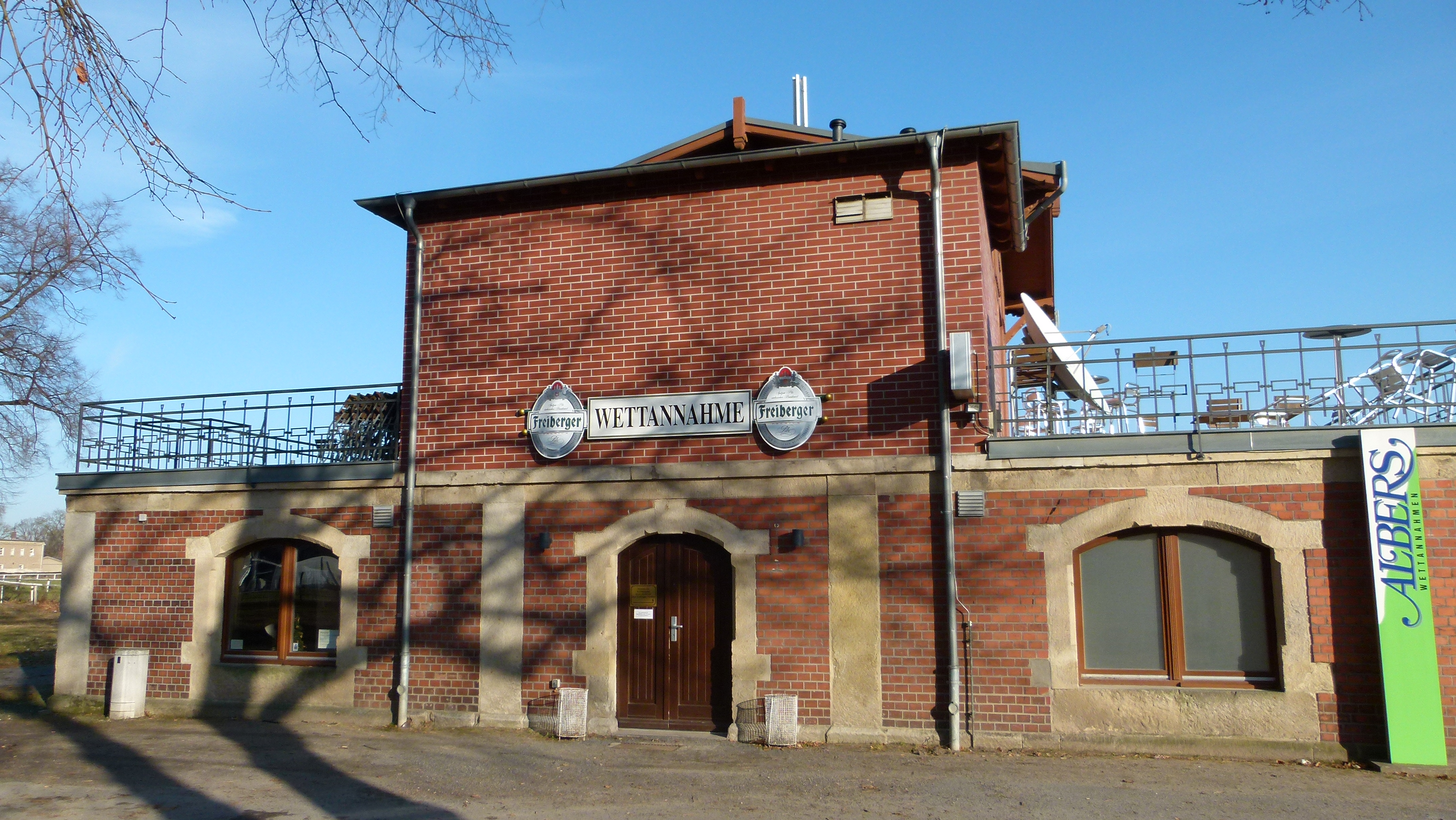 Seidnitzer Pferderennbahn, Seidnitz, Dresden